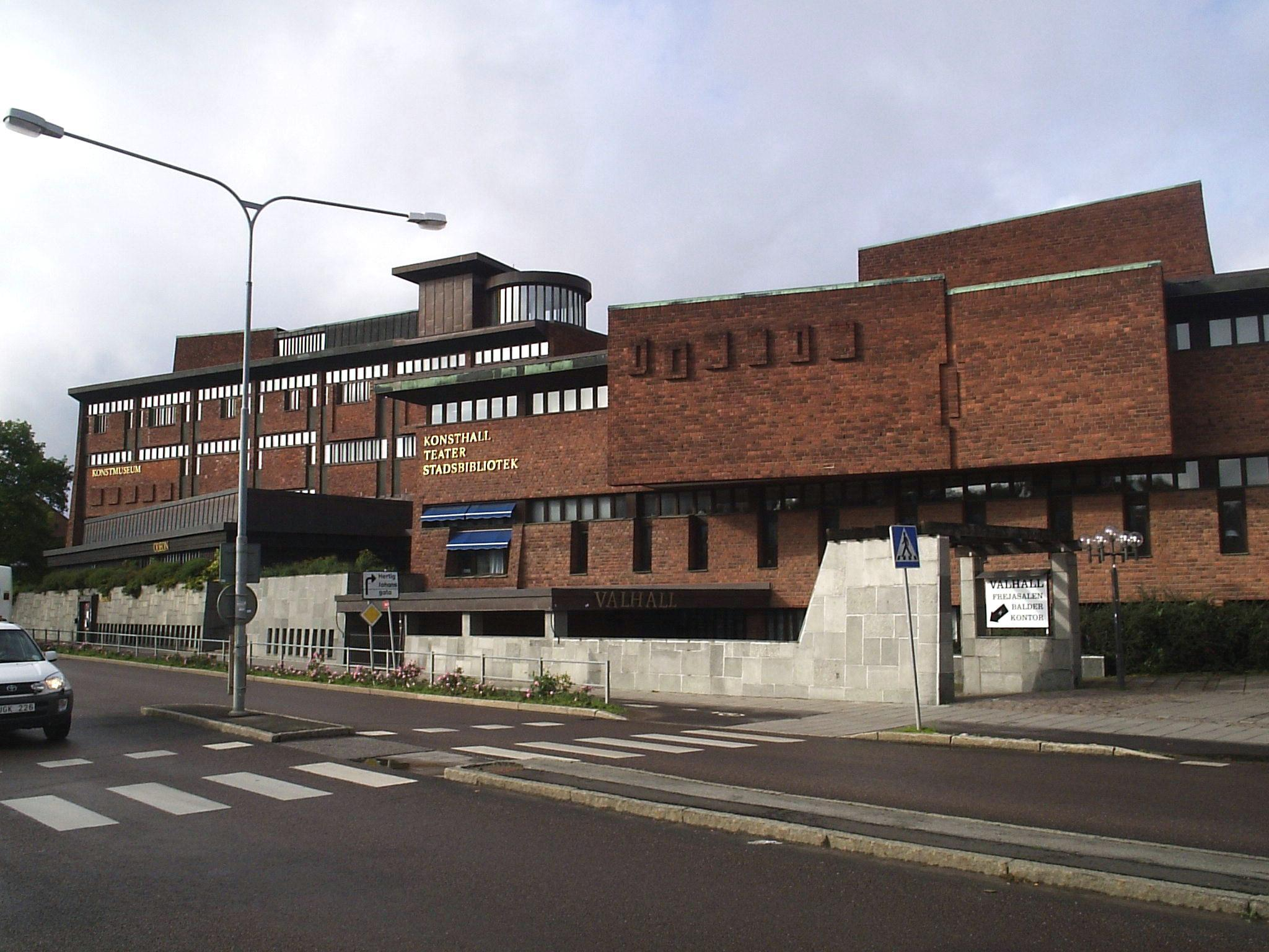 Bilden är fotograferad av Harri Blomberg. Photo by Harri Blomberg.